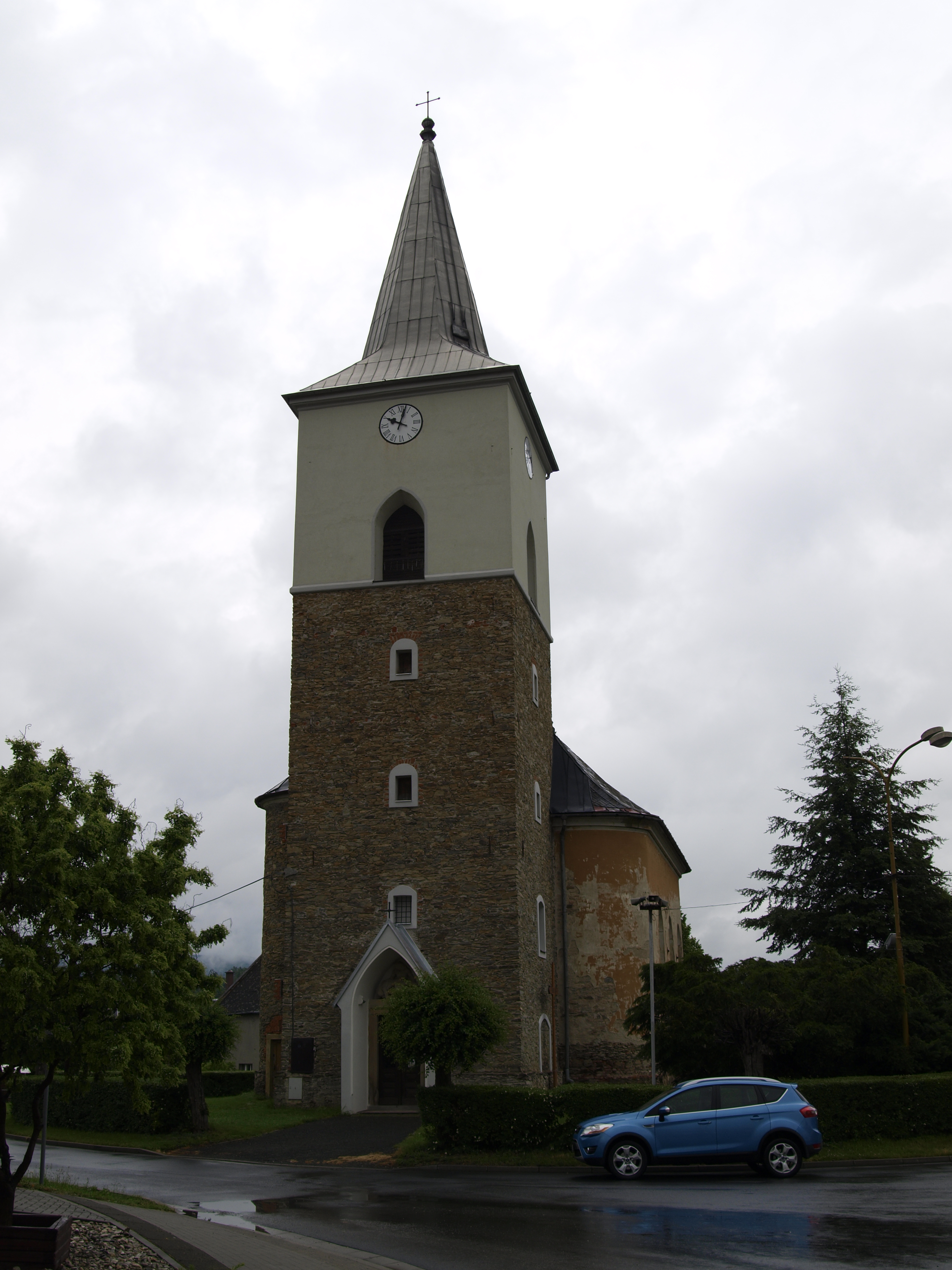 Mladějovice, okres Olomouc, kostel sv. Máří Magdaleny u křižovatky silnic II/444 a 44421, pohled od západu This file was uploaded during the project of WikiTown Litovel.